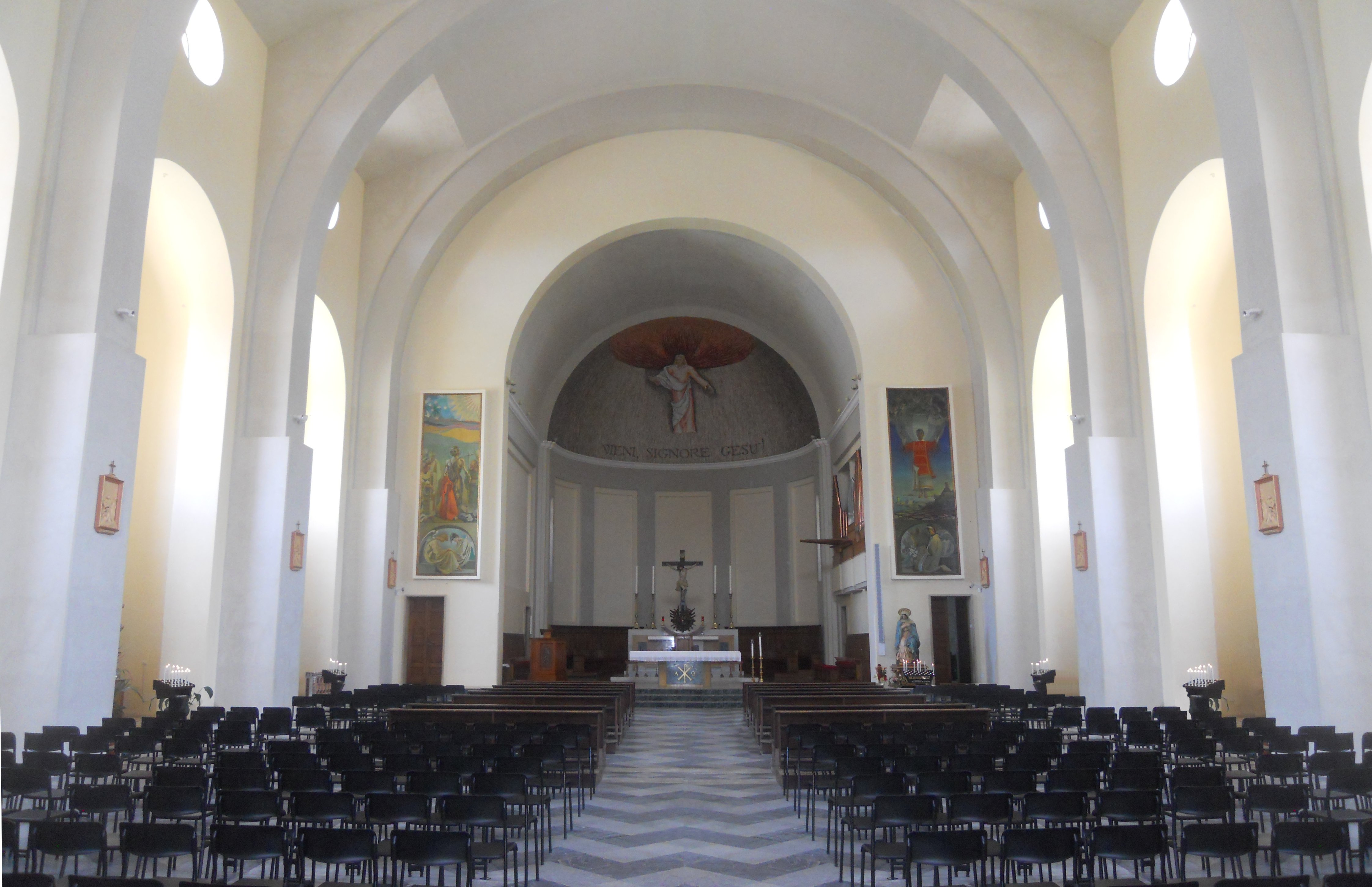 Interno a navata unica e cappelle laterali della chiesa dei santi Lorenzo e Giovanni Battista a Formia.